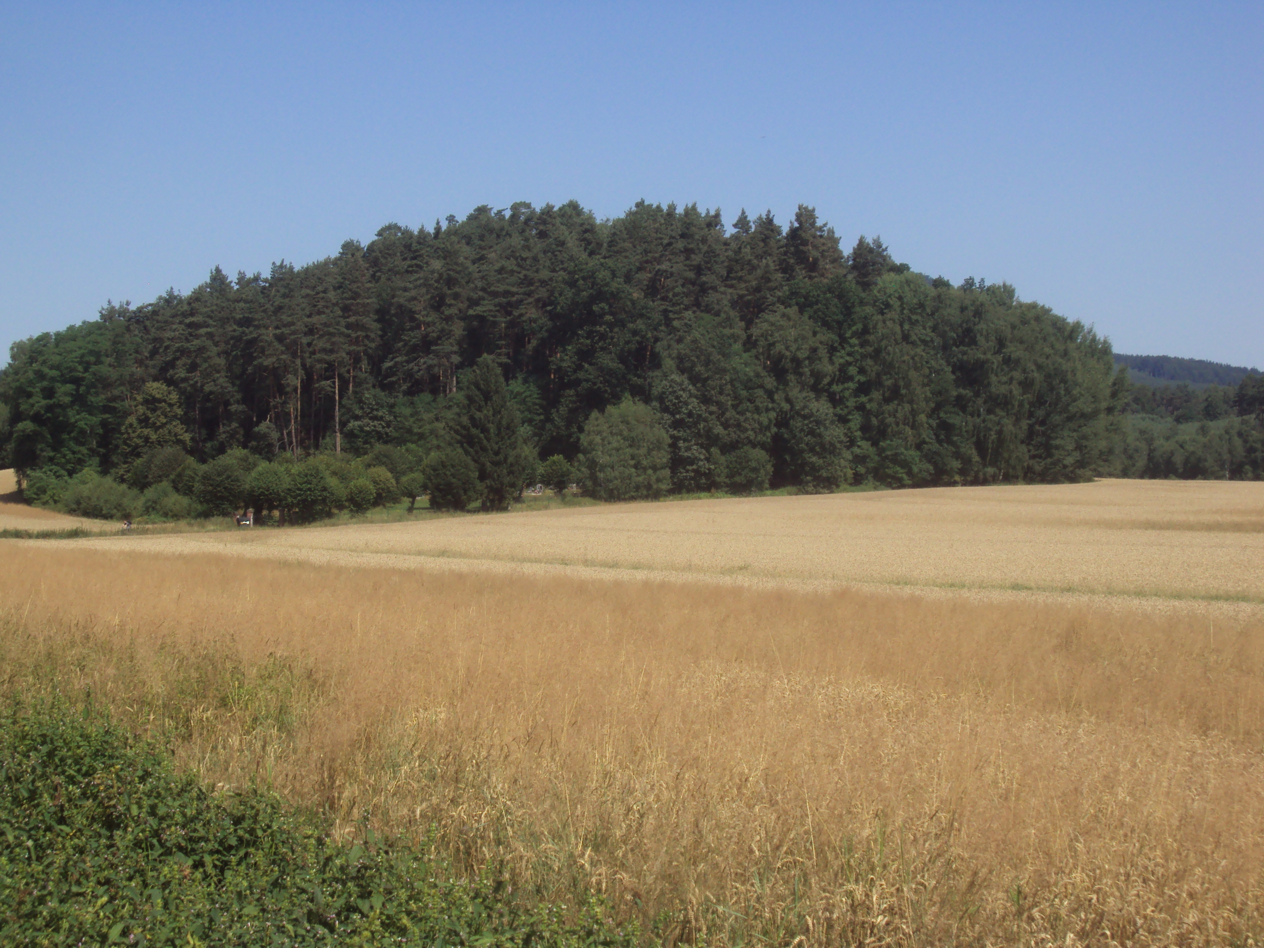 Špaččí vrch od silnice Radvanec - Nový Bor